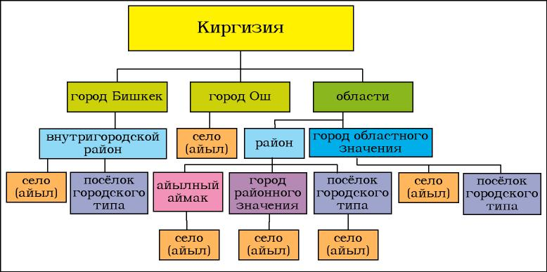 Схема административно-территориального устройства Киргизии